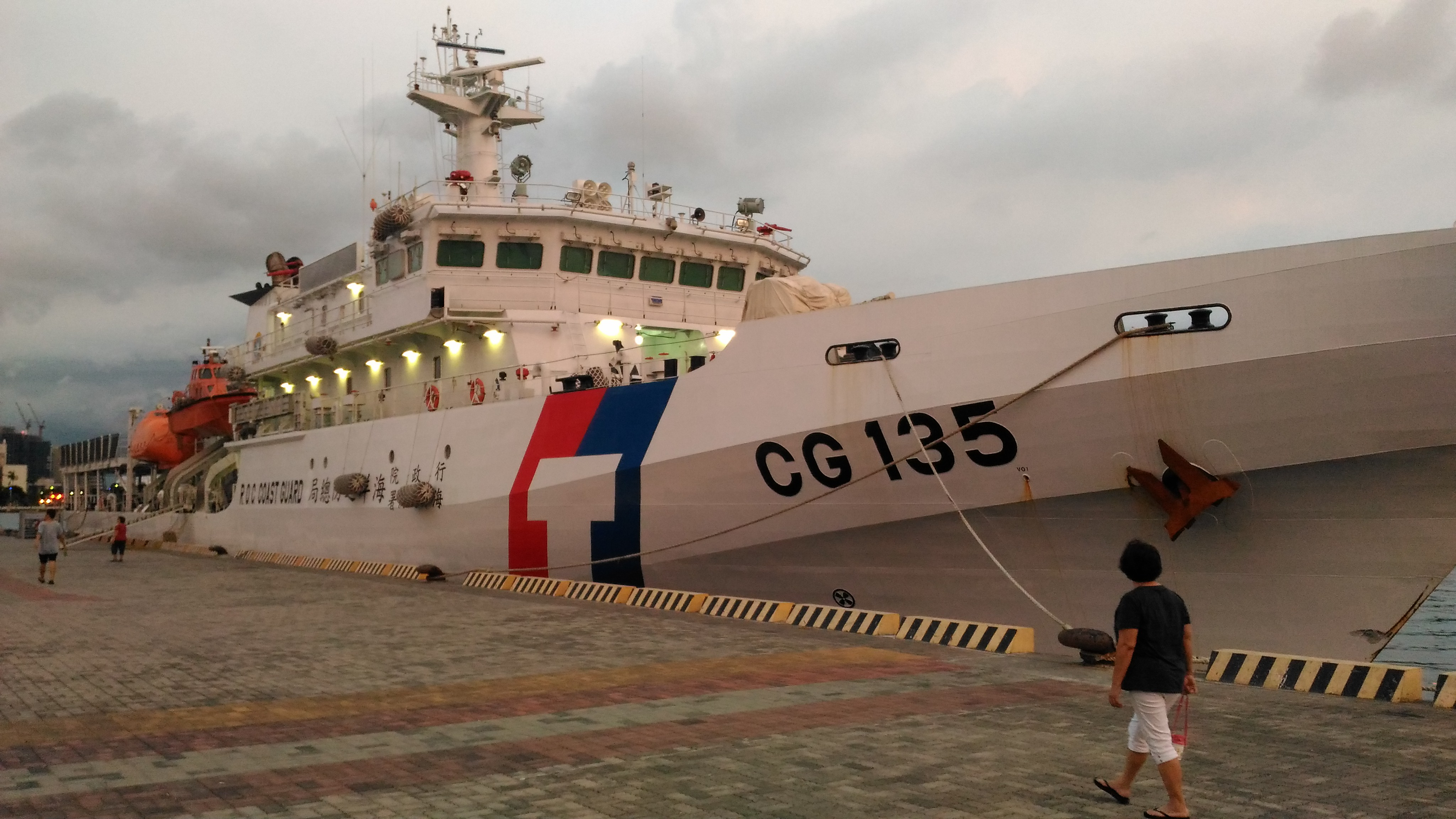 近二千噸級的巡防救難船隻屏東艦